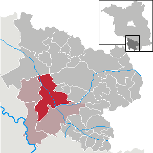 Uebigau-Wahrenbrück in Brandenburg (Country) - District Elbe-Elster